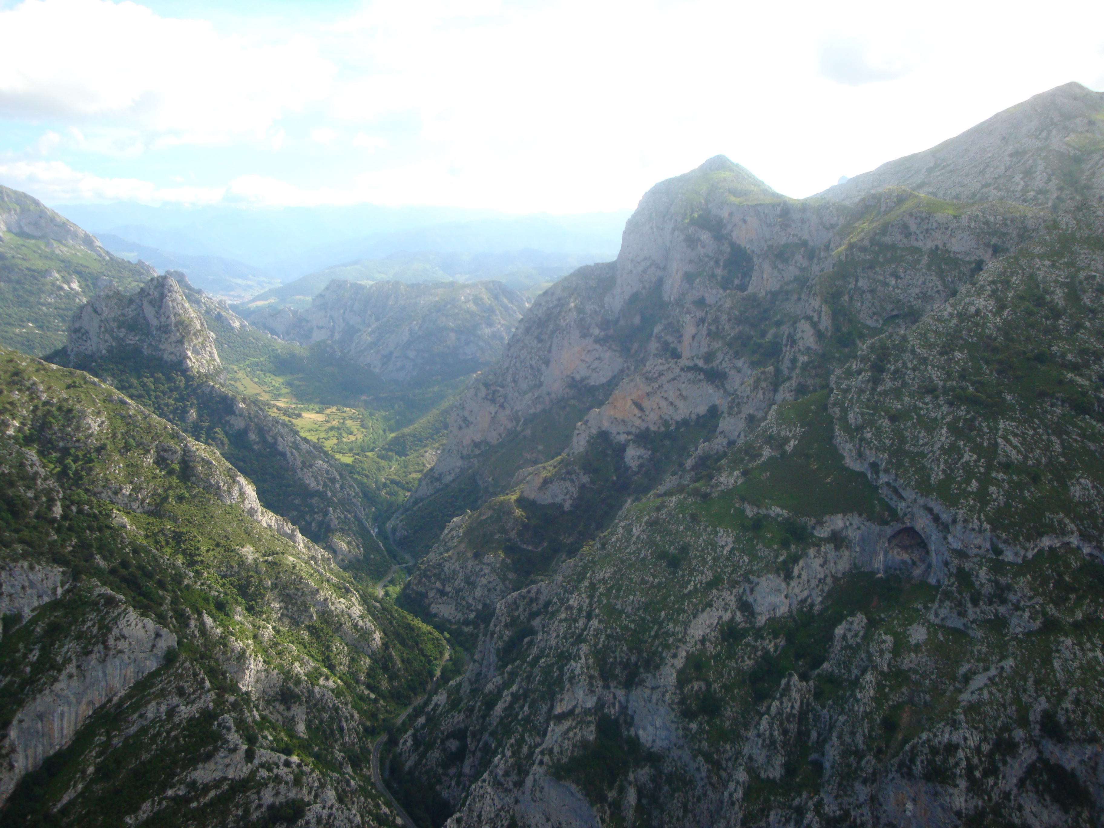 Desfiladero de La Hermida Cantabria desde el Mirador de Santa Catalina, Cicera, Peñarrubia.